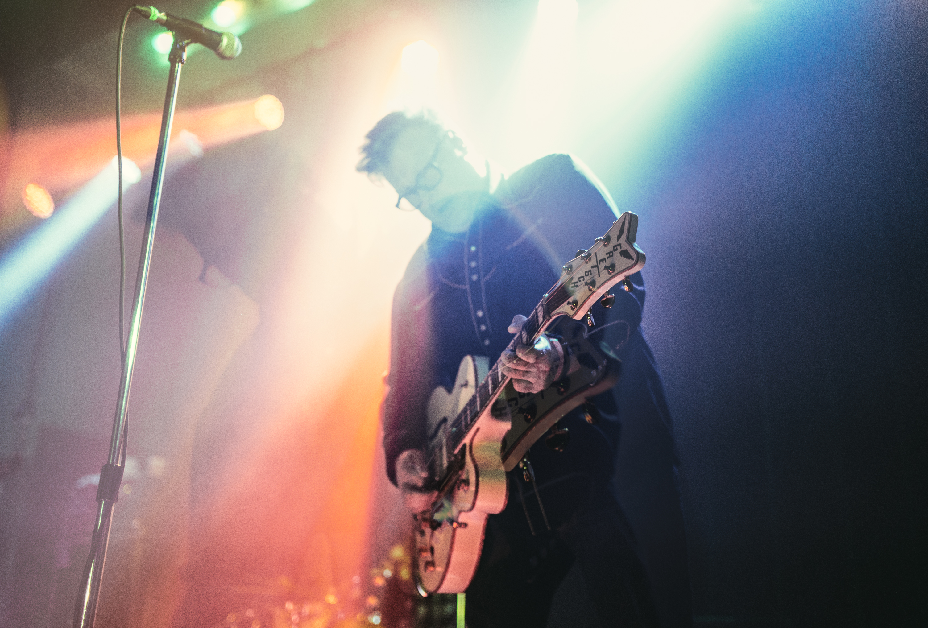 at Up Dt Festival